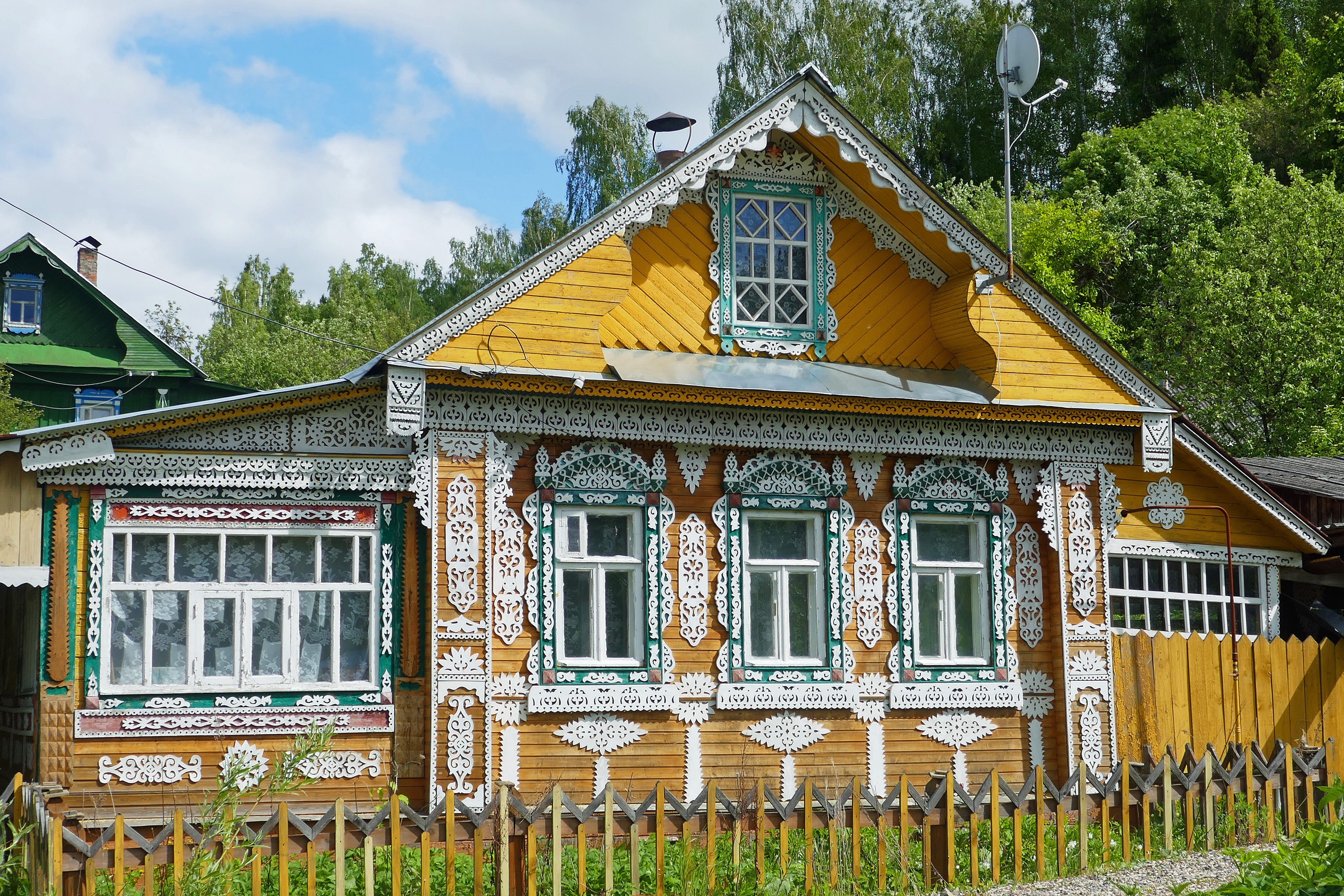 Plyos (Oblast d'Ivanovo) : maison en bois sculpté.